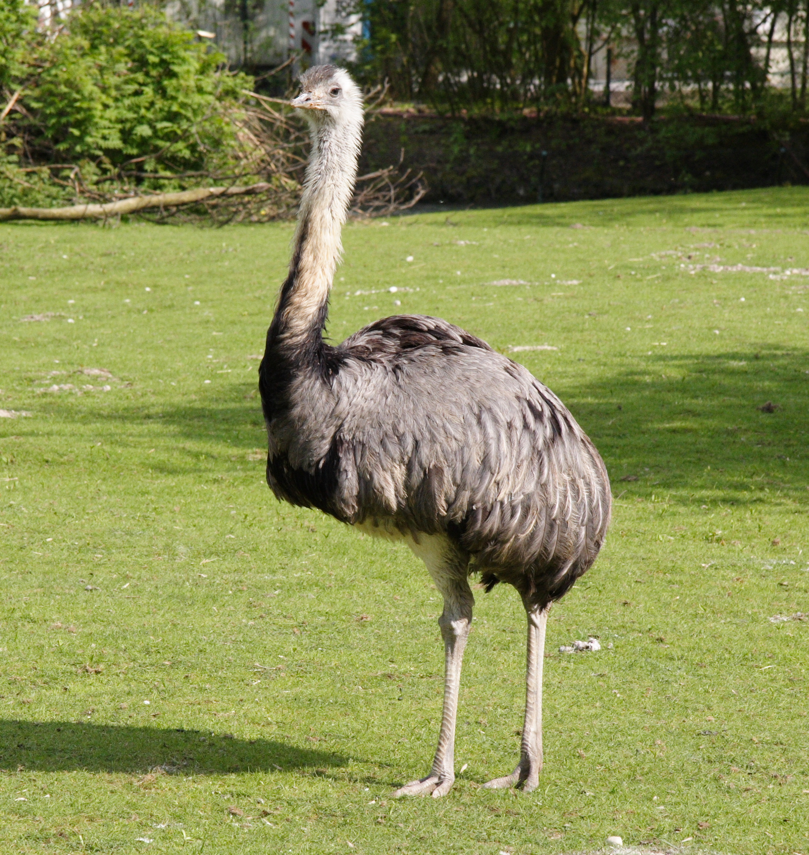 Eigene Aufnahmen, zuerst veröffentlicht hier: Nandu Männchen, Tierpark Hellabrunn